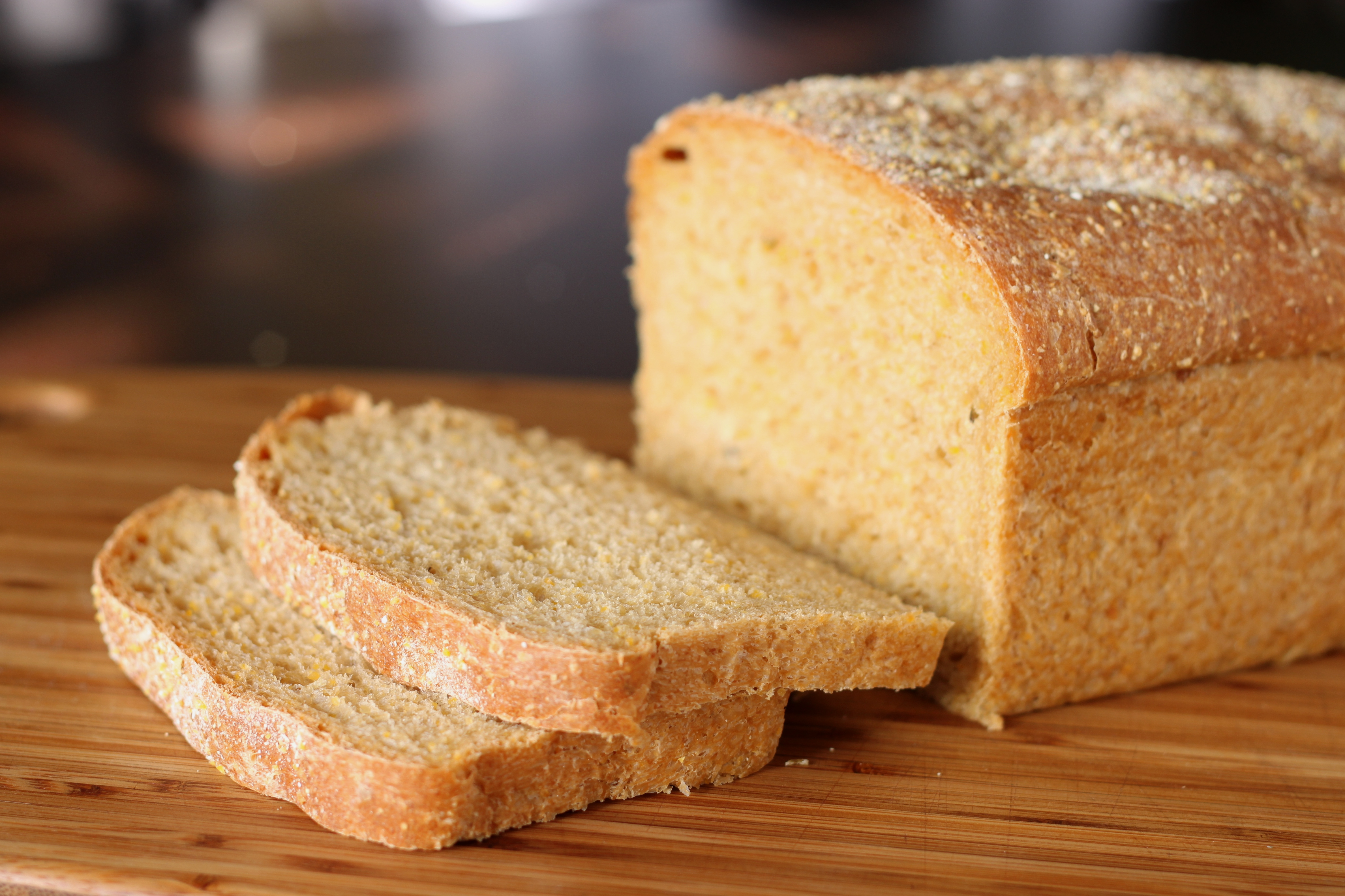 Anadama bread recipe here